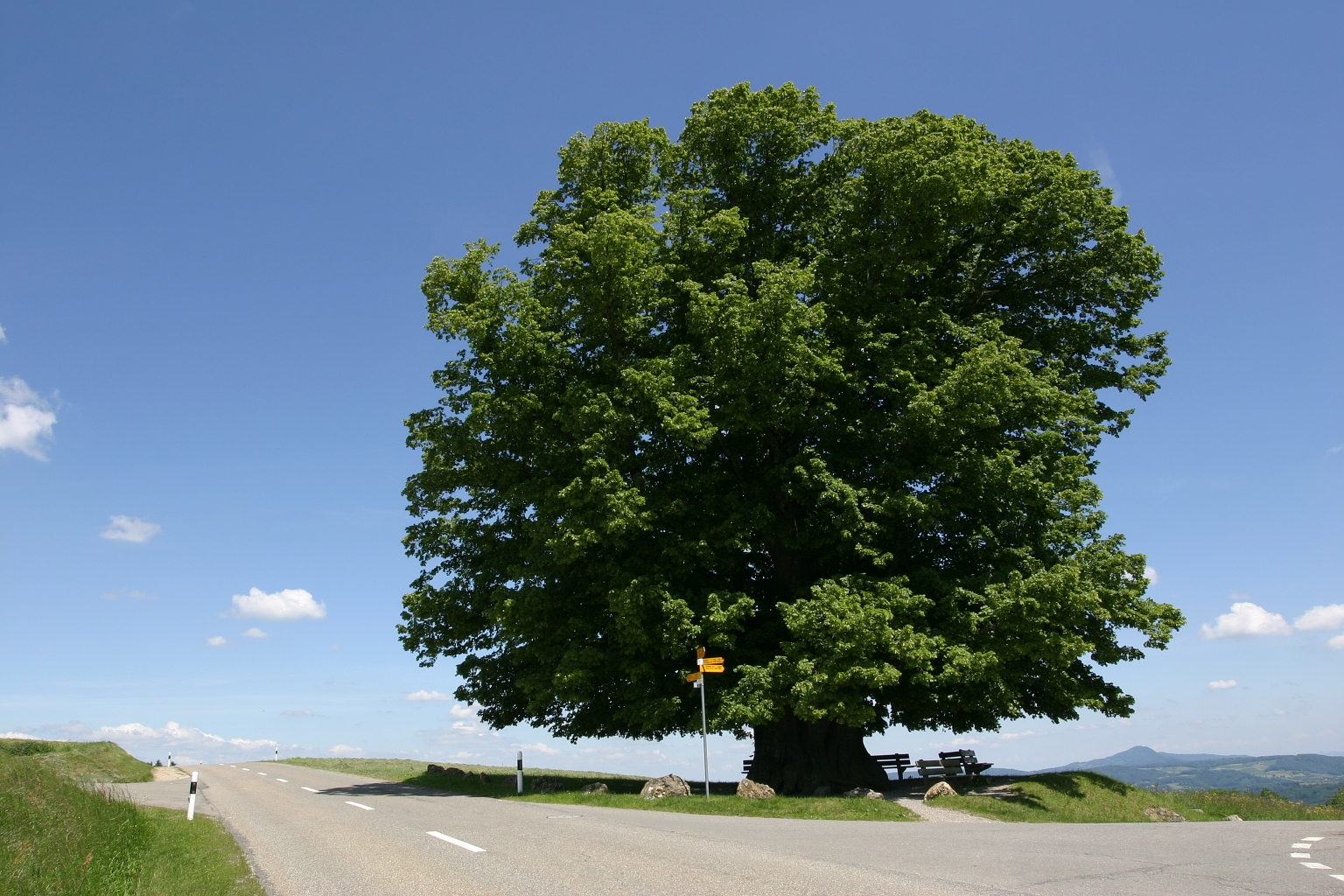 Linde von Linn (Tilia cordata), Linn AG, Schweiz. Height: ~25m (82ft) Circumference: 11m (36ft) Age: 500-600 Years (Other sources mention up to 800 Years)